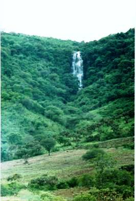 En la epoca de lluvias se puede disfrutar de este espectáculo de la naturaleza. Esta foto fue tomada con una cámara Konica Autoreflex T2 y después escaneada.